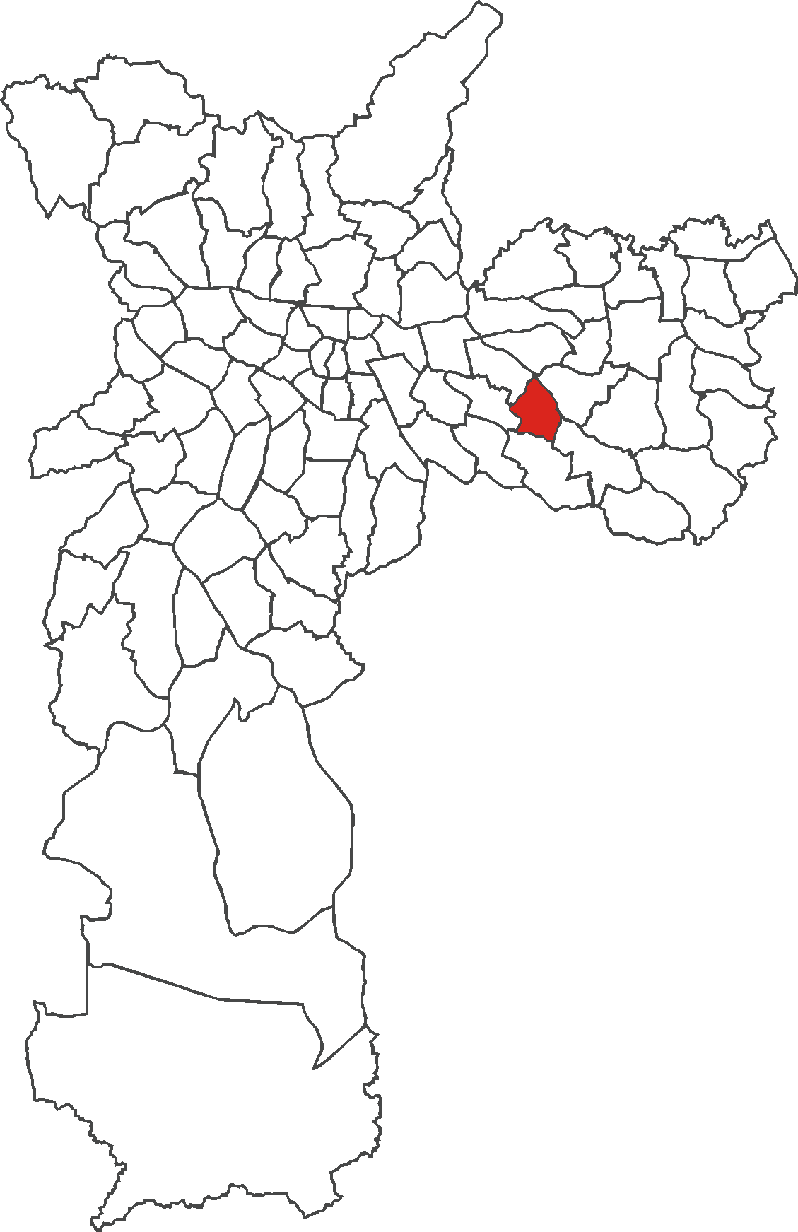 Localização do distrito de Aricanduva no município de São Paulo.